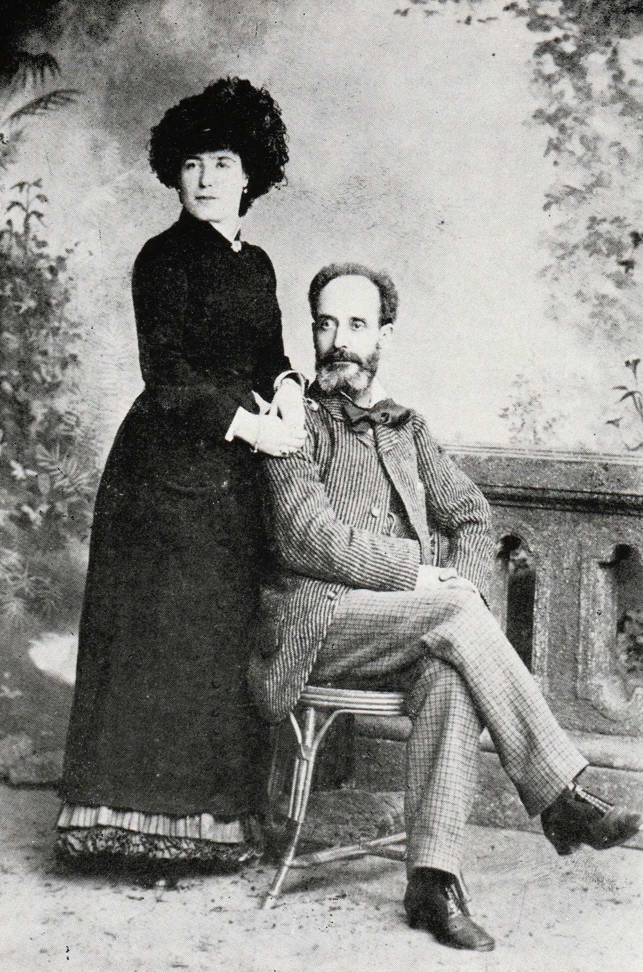 Pere Mauri amb la seva filla Roseta Mauri cap al 1880